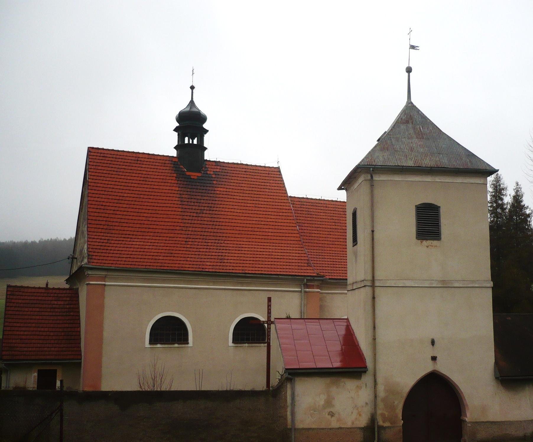 Raszków. Kosciół